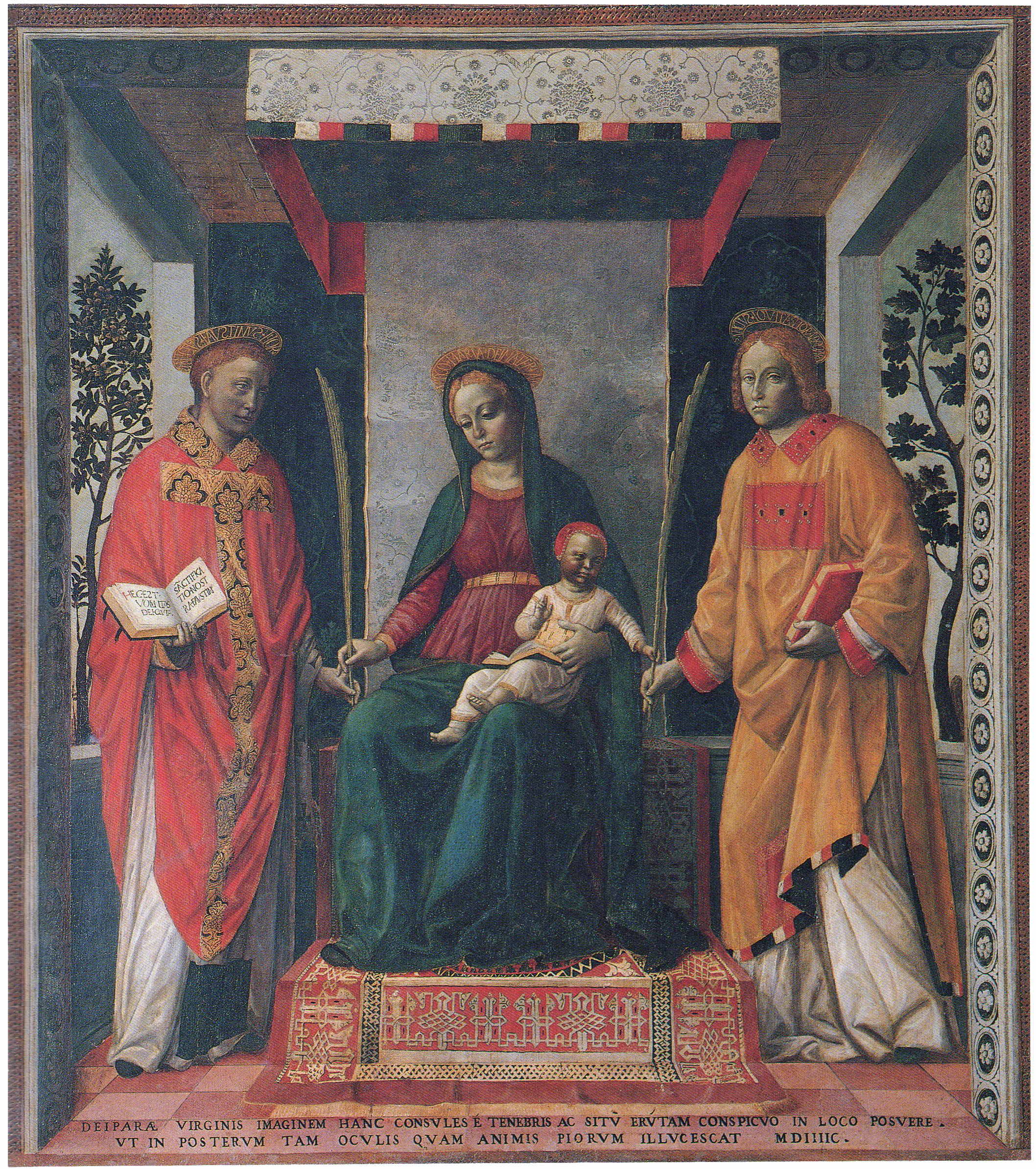 Vincenzo Foppa, Pala della Mercanzia. Opera esposta nella Pinacoteca Tosio Martinengo a Brescia.